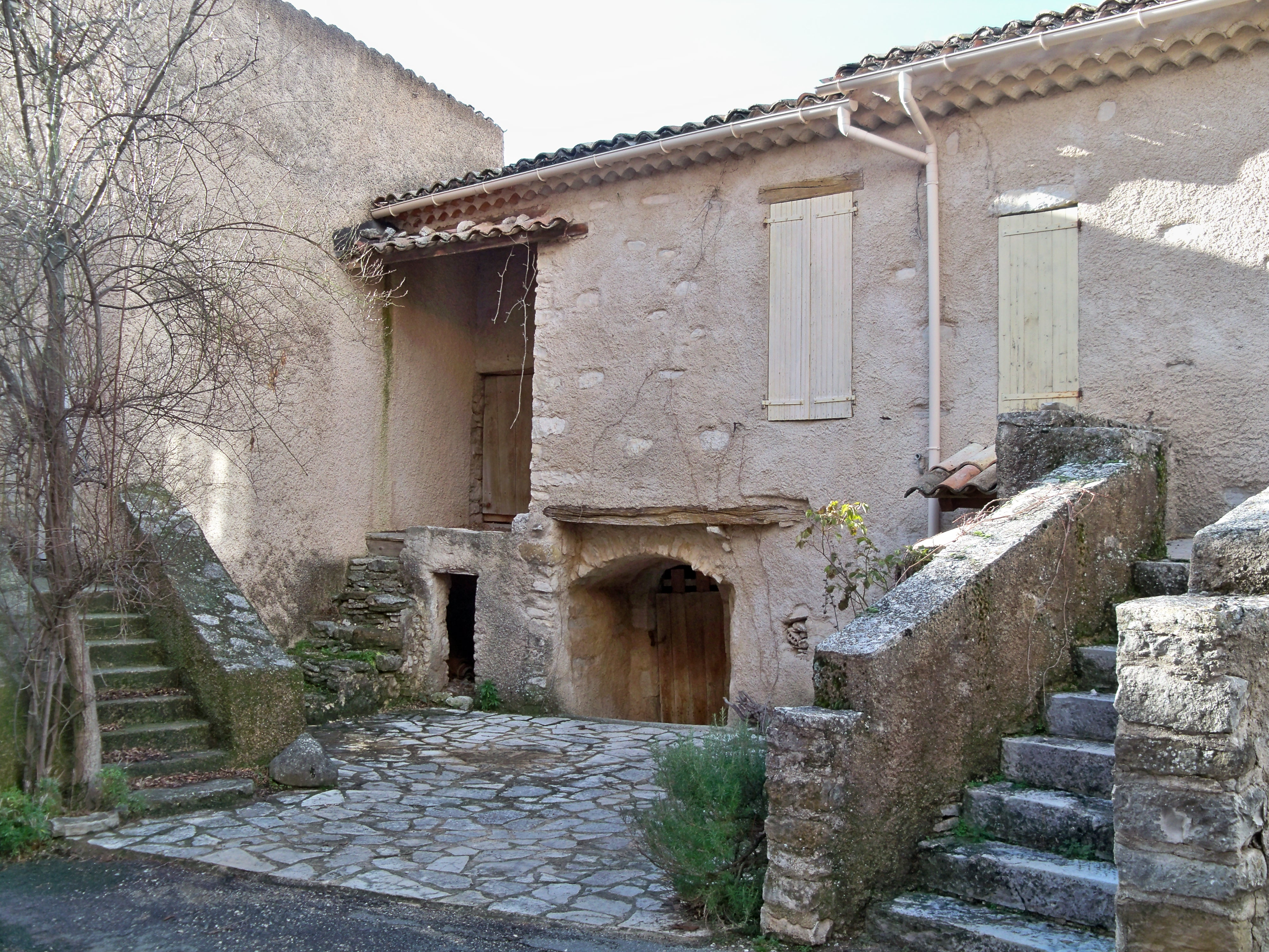 habitat à Lardiers, Alpes de Haute Provence, France